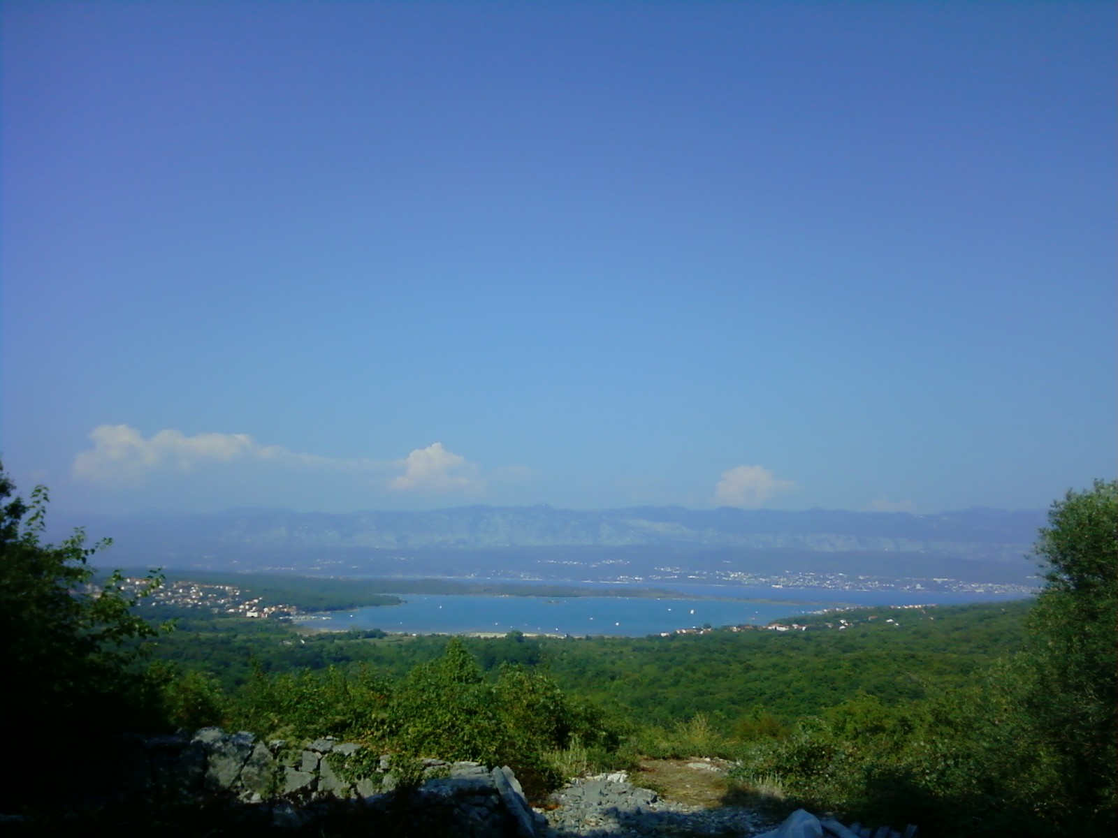 Otok Krk. Pogled na uvalu Soline sa zapada, iz mjesta Sužan. Lijevo su Čižići, u sredini se vidi lokalitet Meline (pješćanik), desno su Soline, a u njihovoj pozadini se djelomično vidi Klimno. Nasuprot uvale, na kopnu, je Crikvenica.